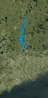 Lake Päijänne highlighted on a sat photo.